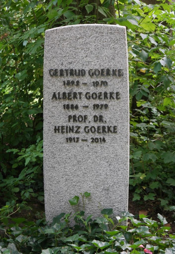 Grab des Medizinhistorikers Heinz Goerke, 1917-2014, auf dem Waldfriedhof in München-Solln